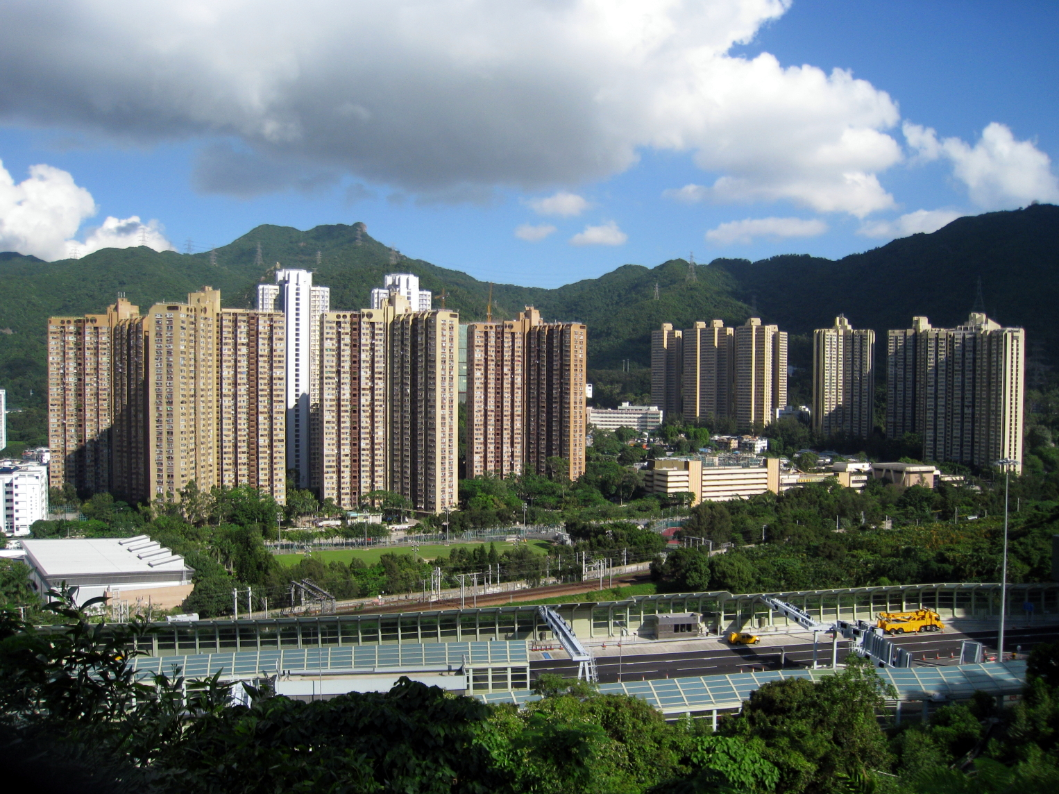 Hin Keng Estate 顯徑邨